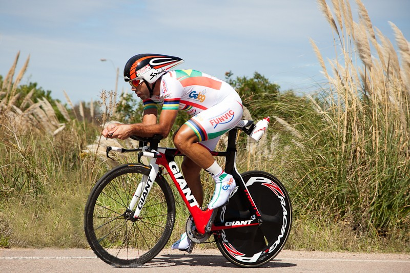 Magno Nazaret do Prado, ciclista brasileño del equipo Funvic, durante la Vuelta ciclista del Uruguay 2012